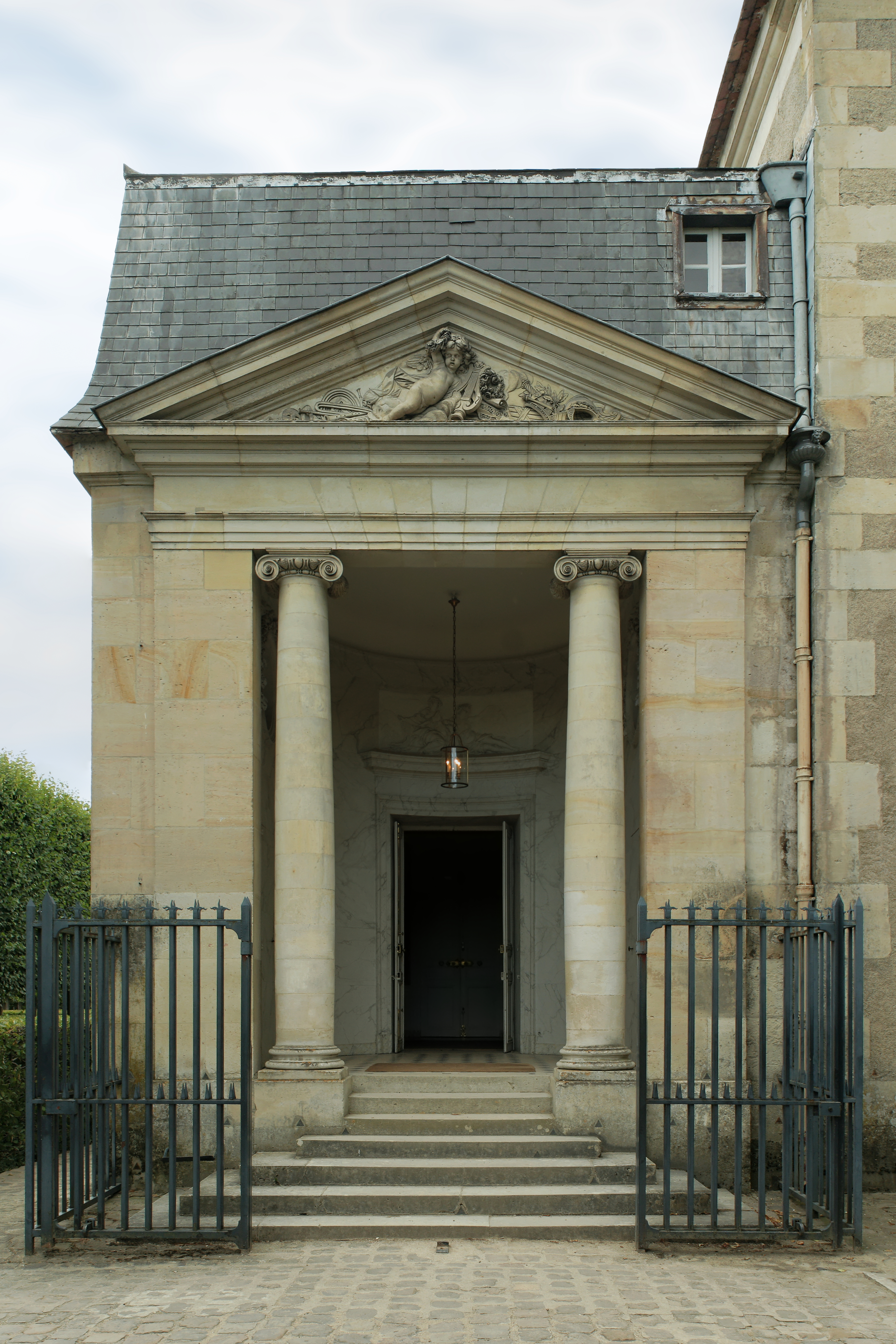 Entrée du Théâtre de la Reine de Richard Mique, dans le jardin du Petit Trianon.